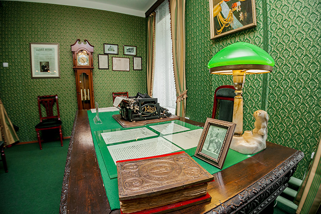 Дом-музей Чиновника Суханова, Приморский государственный объединённый музей им. Арсеньева